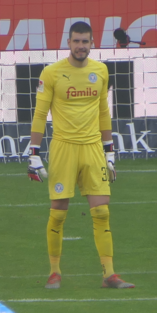 Der Fussballprofi Ioannis Gelios im Trikot von Holstein Kiel beim Auswärtsspiel gegen den VfB Stuttgart am 20.10.2019.